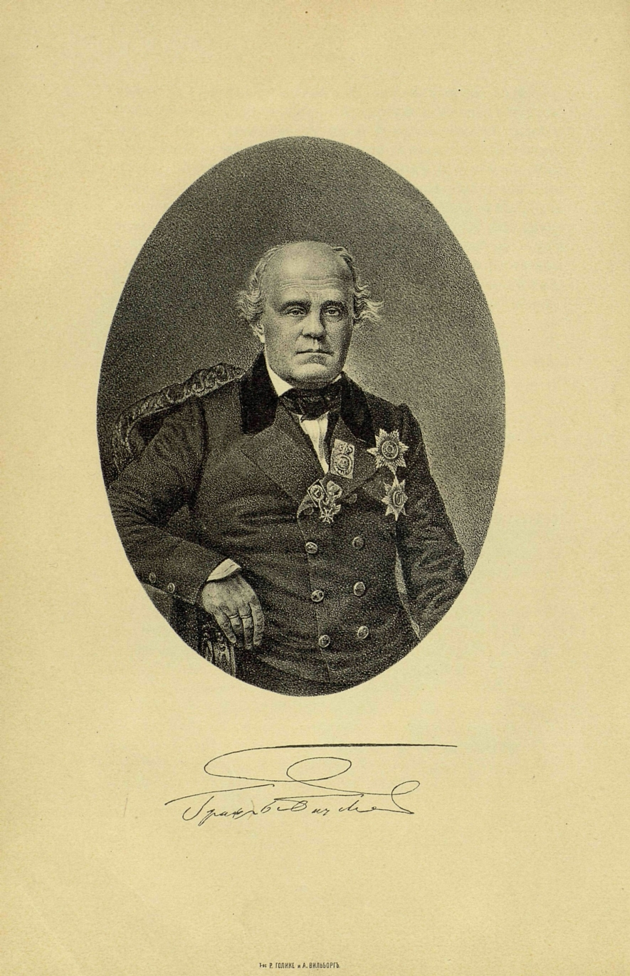 Портрет Д. Н. Блудова